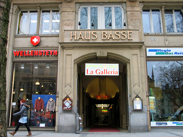 Der Zugang zum Haus Basse in der Georgstraße 54 zwischen den Geschäftsräumen Wellensteyn und Regio Bus Reisen, darüber ein Teil der Fensterfront im Ersten Stock ...